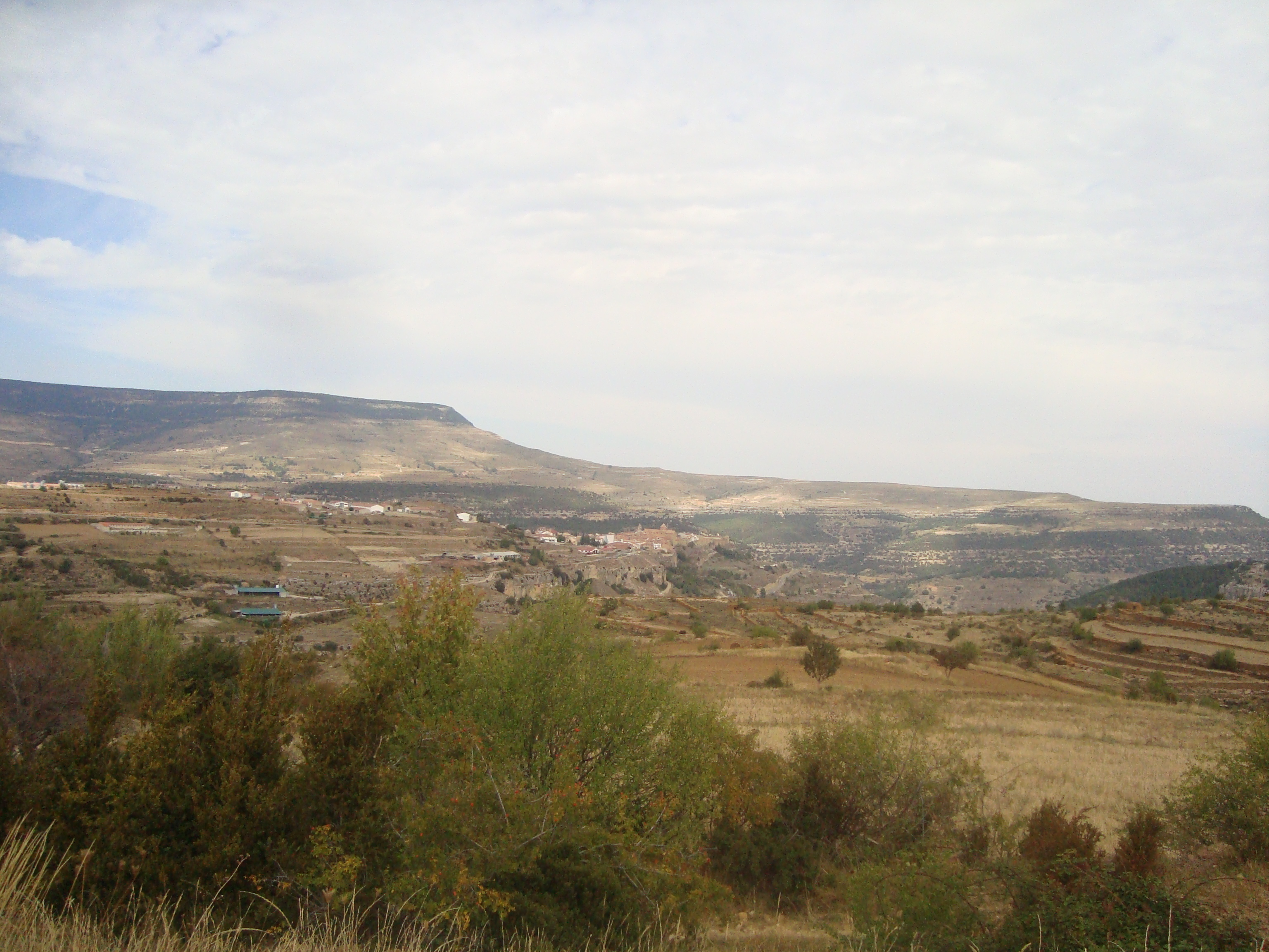 Panorámica de Cantavieja (Teruel)